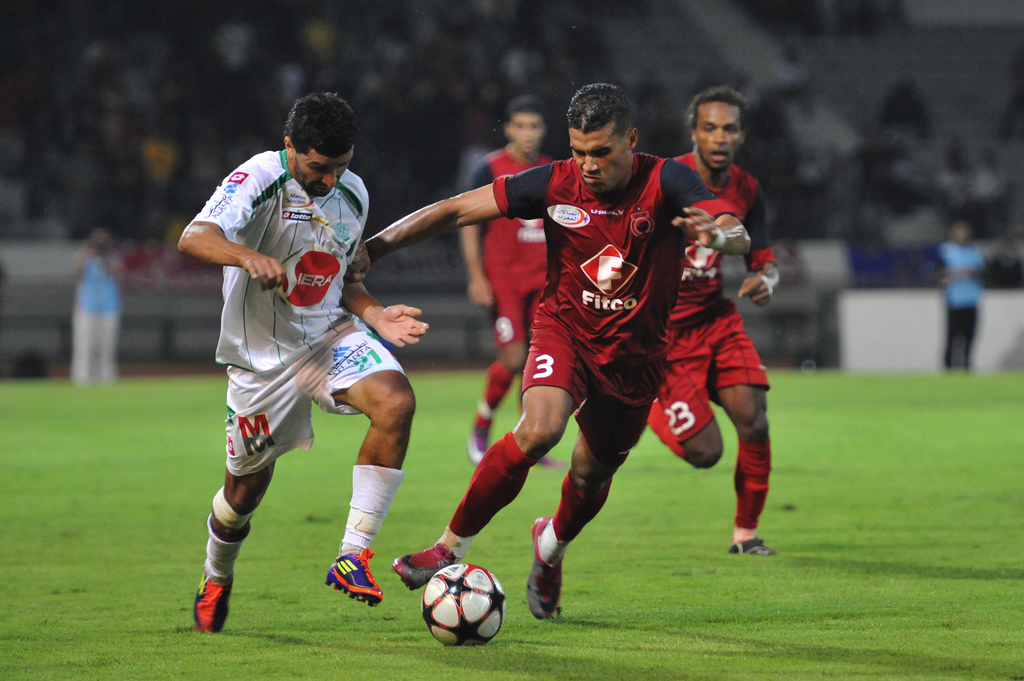 Matche entre le raja et l'olympique de Safi en 2011